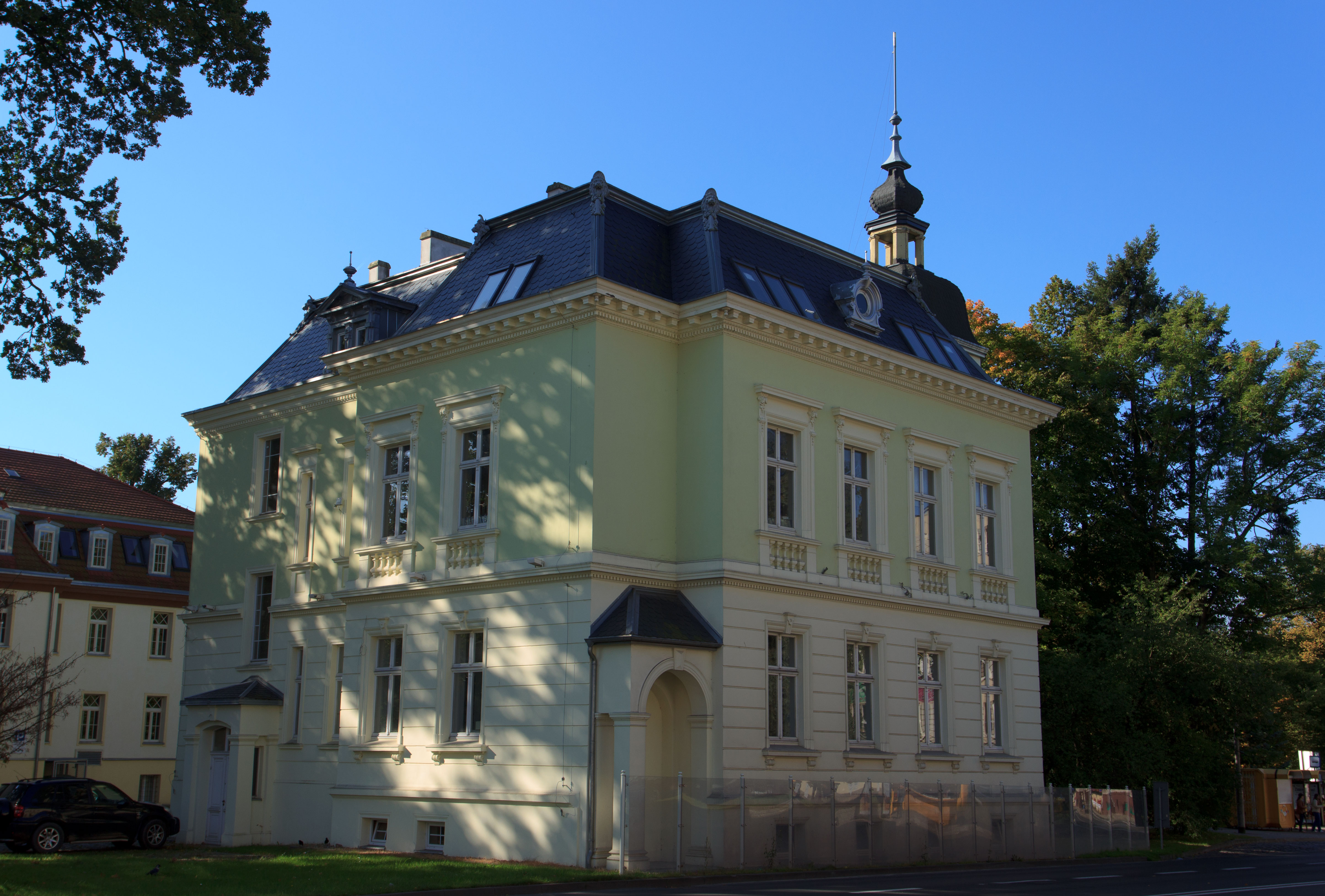 Koszalin, ul. Zwycięstwa 126 - Willa (XIX/XX w)